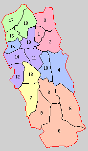 福岡県田川郡域の町村制時点の町村。